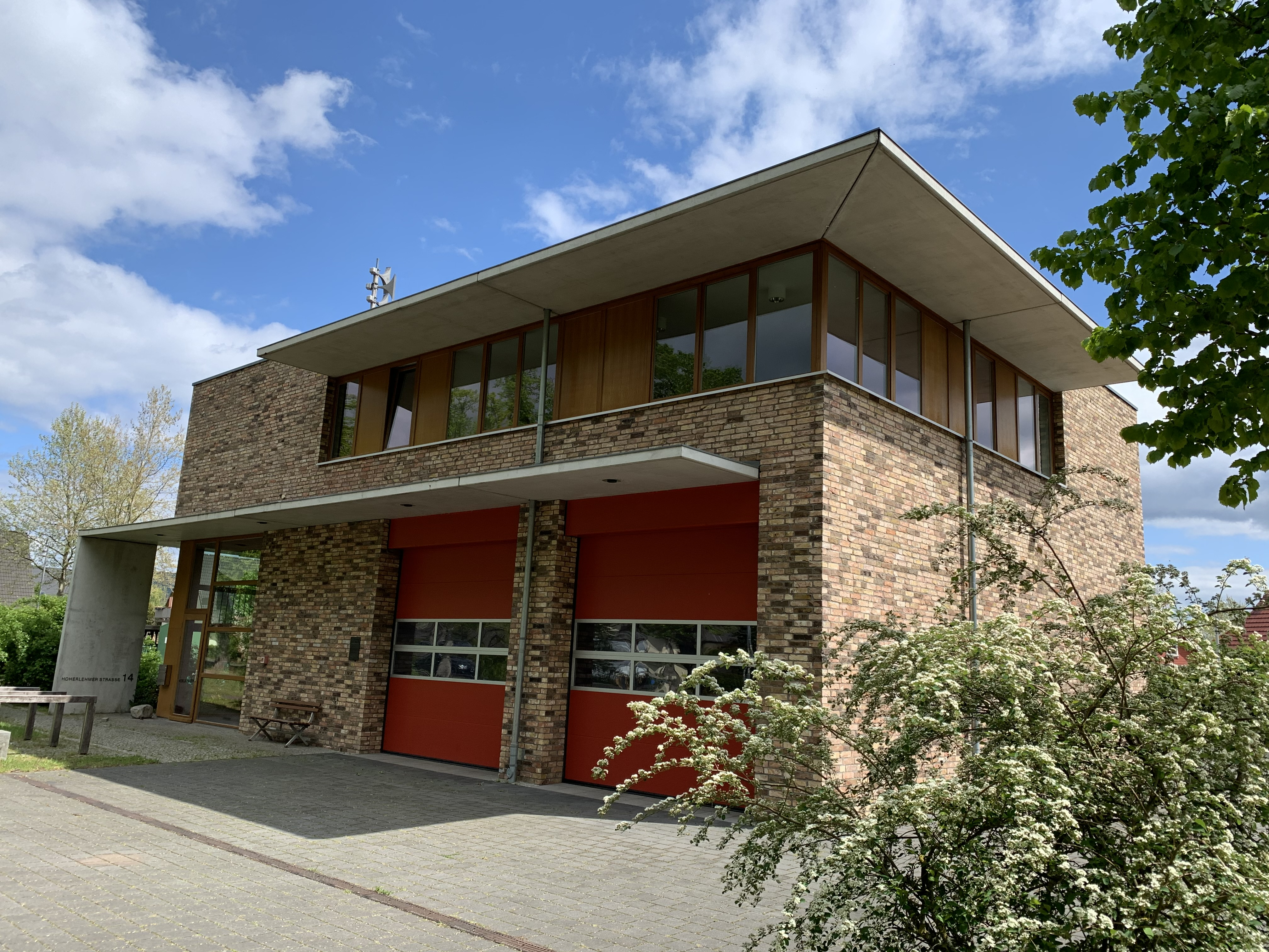 Diepensee, ein Ortsteil der Stadt Königs Wusterhausen in Brandenburg